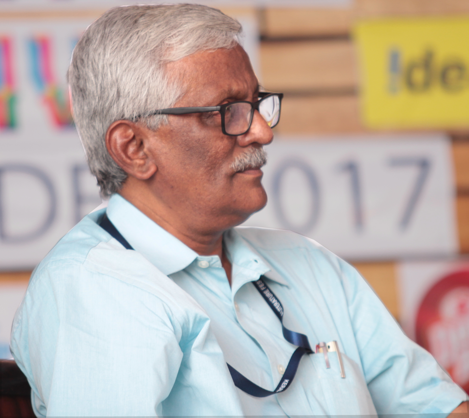 ഇ.പി ഉണ്ണി കോഴിക്കോട് ലിറ്ററേച്ചര്‍ ഫെസ്റ്റിവലില്‍ (2017)